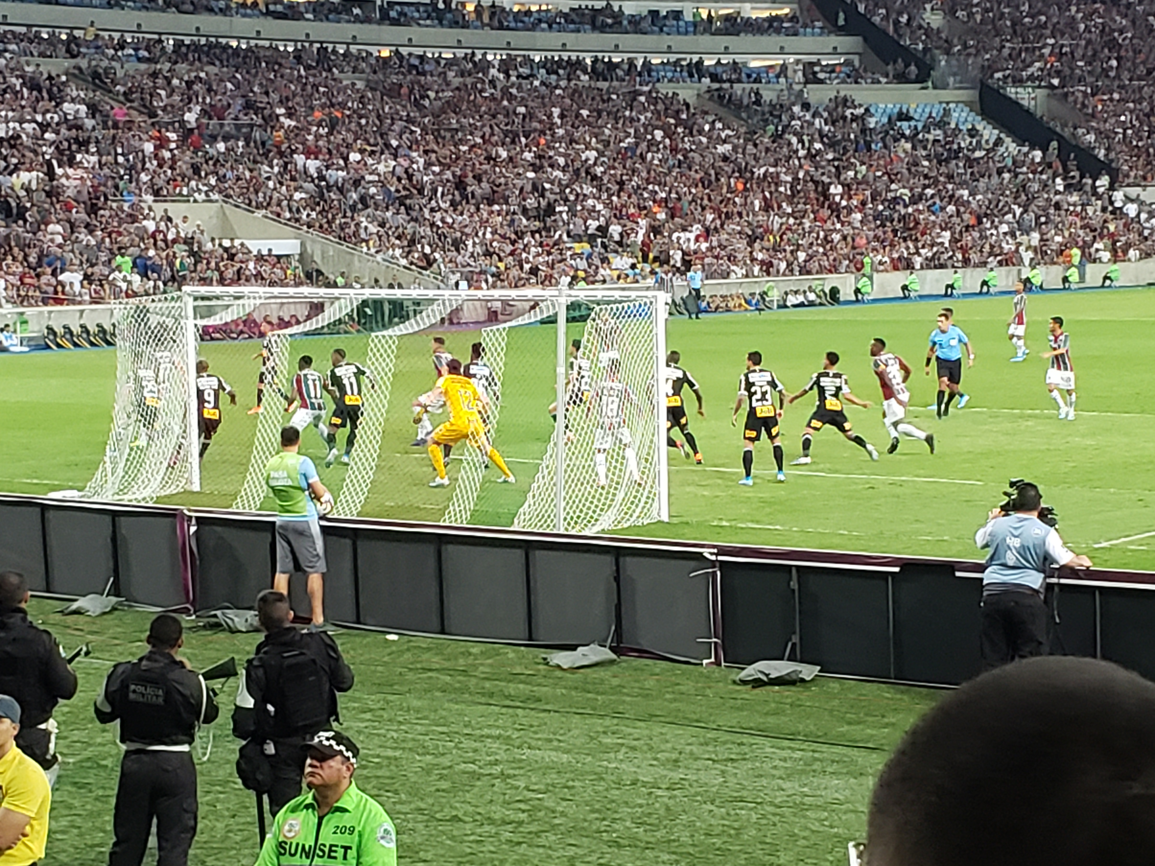 Fluminense Football Club contra o Corinthians na Copa Sul-Americana de 2019, partida disputada no Maracanã em 29/08/2019 e que terminou empatada por 1 a 1.